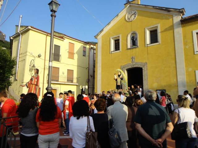 Fusara di Baronissi (SA), Campania